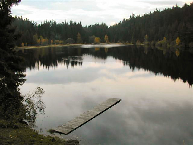 Photograph of Rubener Pond (Rubener Teich), Tanner Moor, Upper Austria